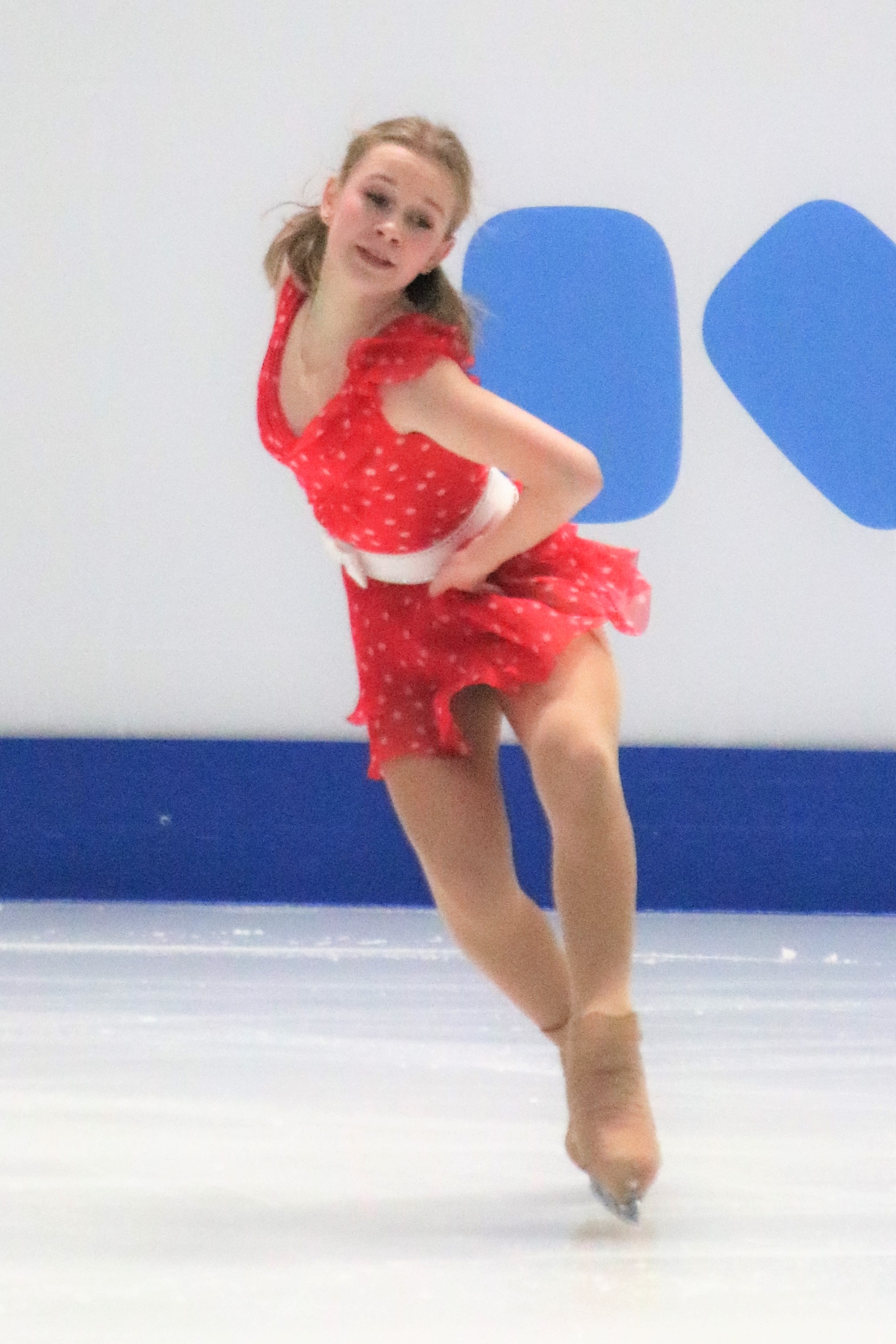 Екатерина Куракова (Польша) на чемпионате Европы по фигурному катанию 2020